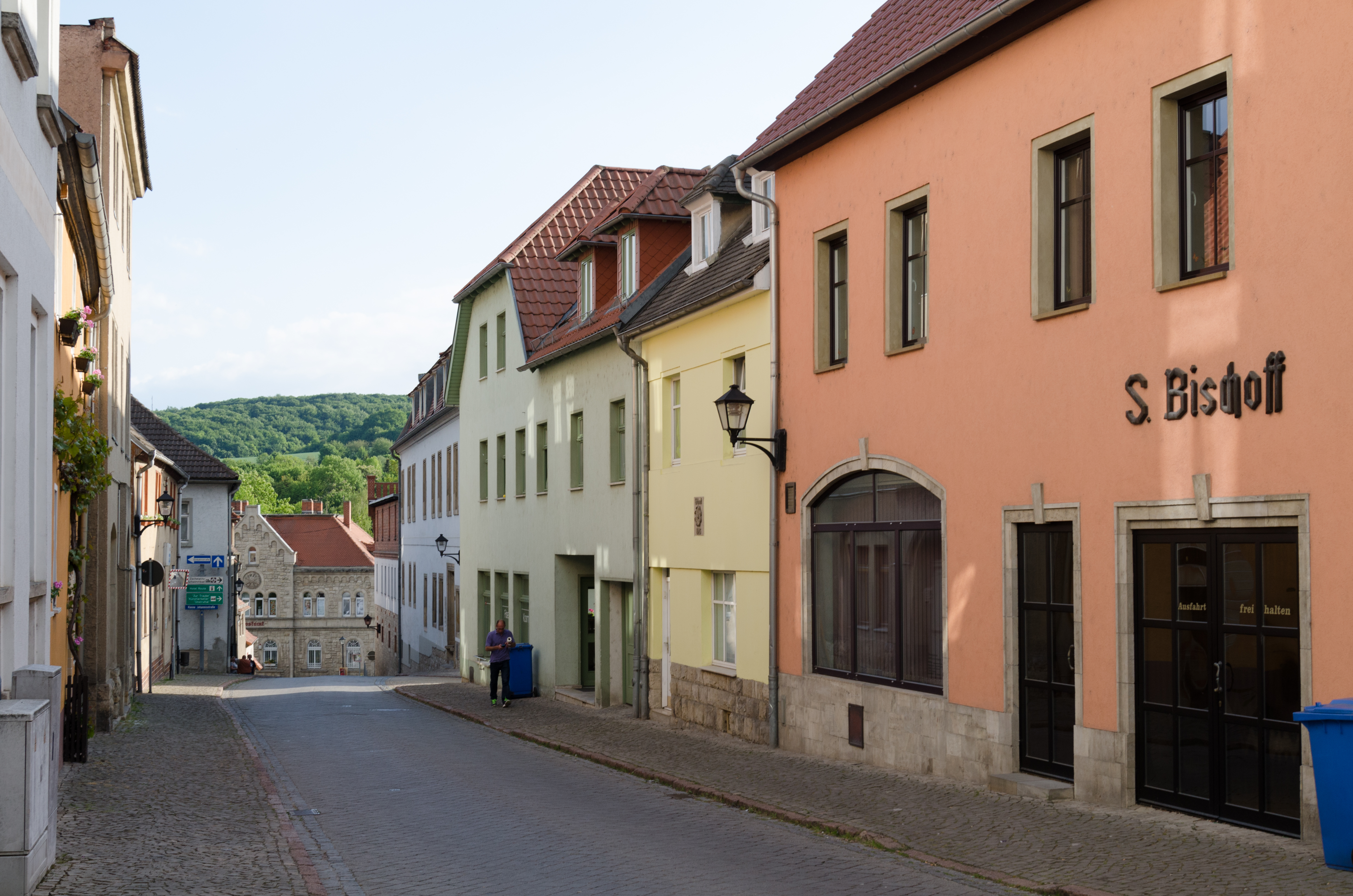 Freyburg an der Unstrut, Marienstrraße